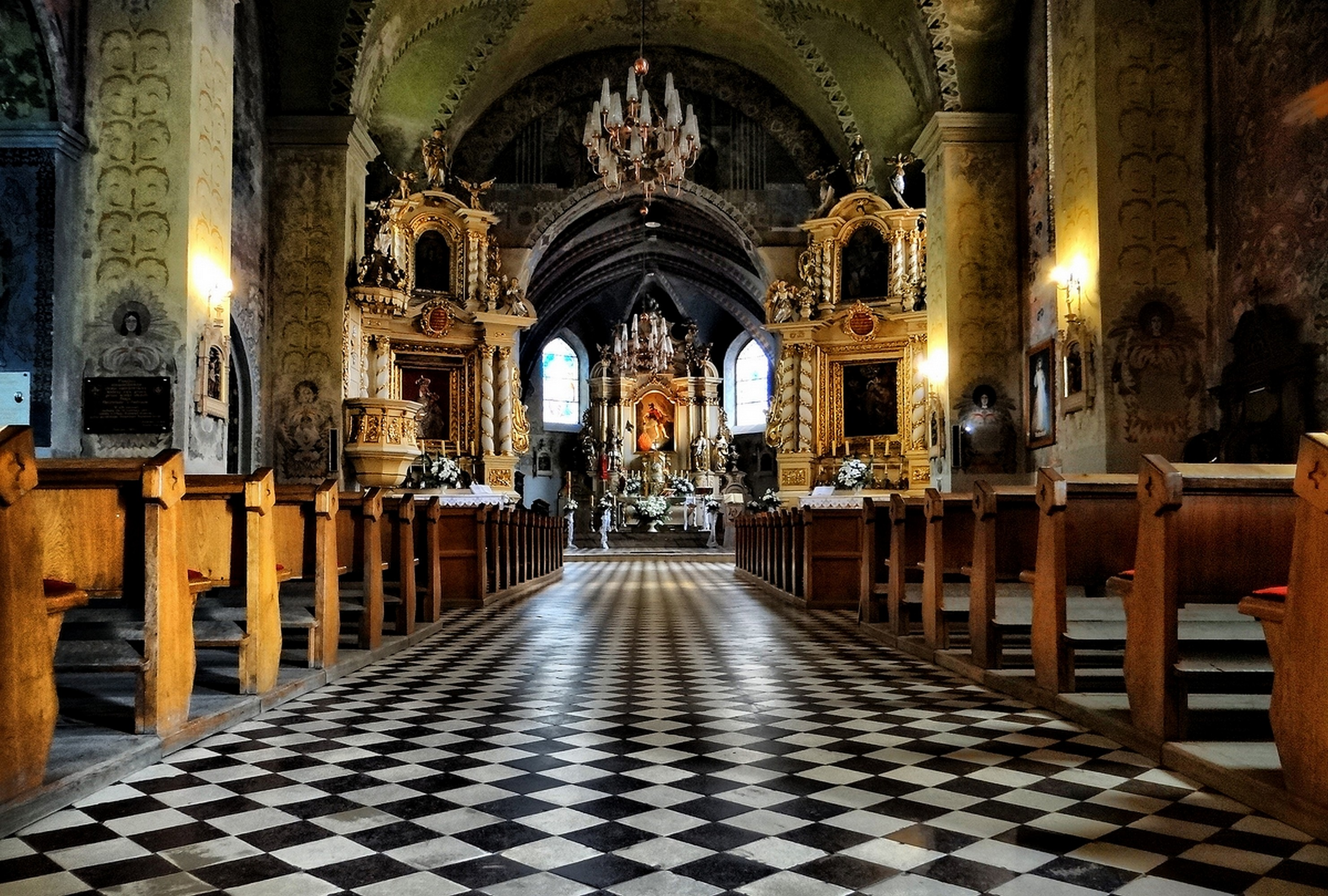 Uniejów, kolegiata Wniebowzięcia NMP, poł. XIV